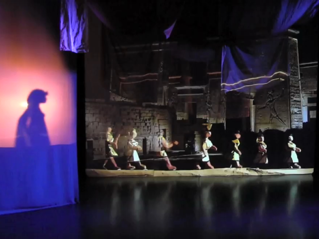 Scène extraire de « Disparus dans la Lumière-temps » d'après les livres des morts de l'Égypte ancienne